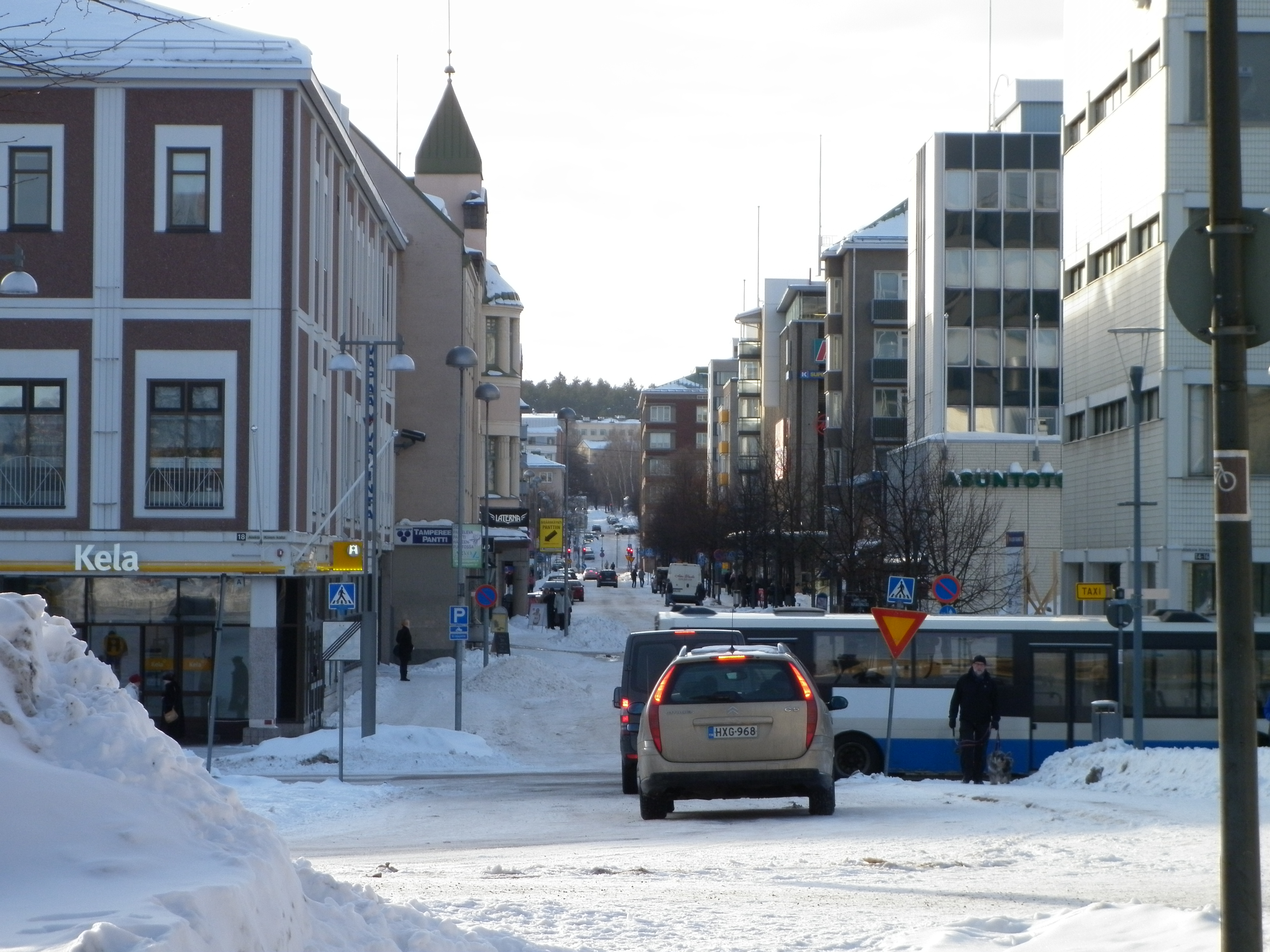 Puutarhakatu Keskustorilta talvella